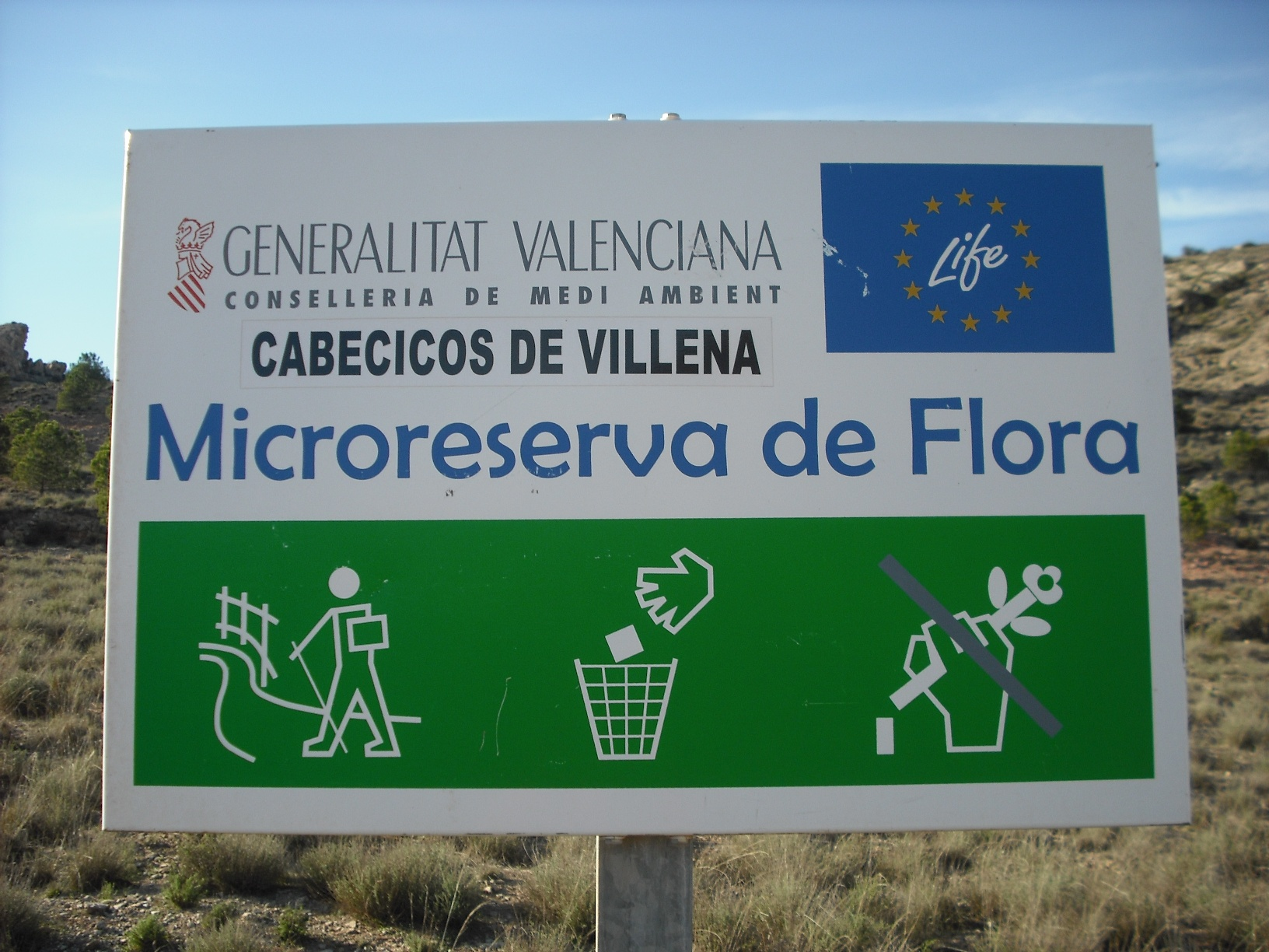 Microrreserva de flora "Los Cabecicos" de Villena This is a photography of a Special Area of Conservation in Spain with the ID: ES5212007. Natura2000 entry, EEA entry